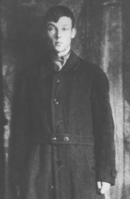 Беларуская (тарашкевіца): Юрка Лістапад